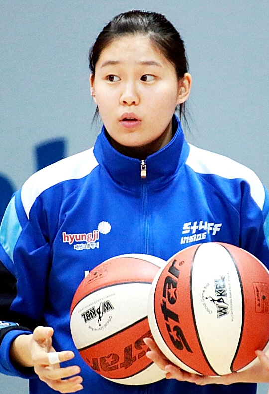 160110 여자농구 신한은행 vs 삼성생명 직찍 1